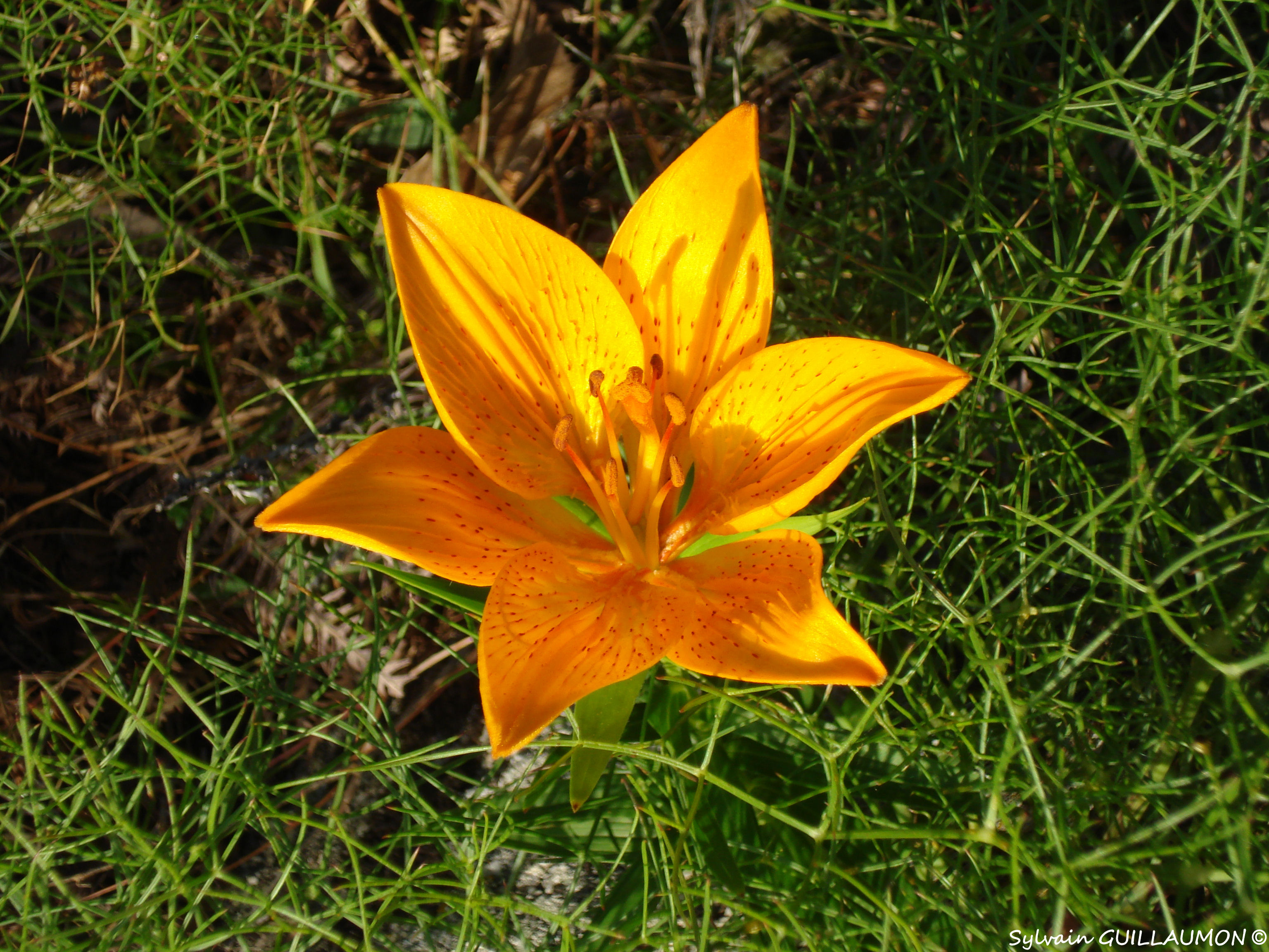 Zoom sur un lys orangé, dans la descente entre le sommet du Monte Astu (1535 m) et Lama.